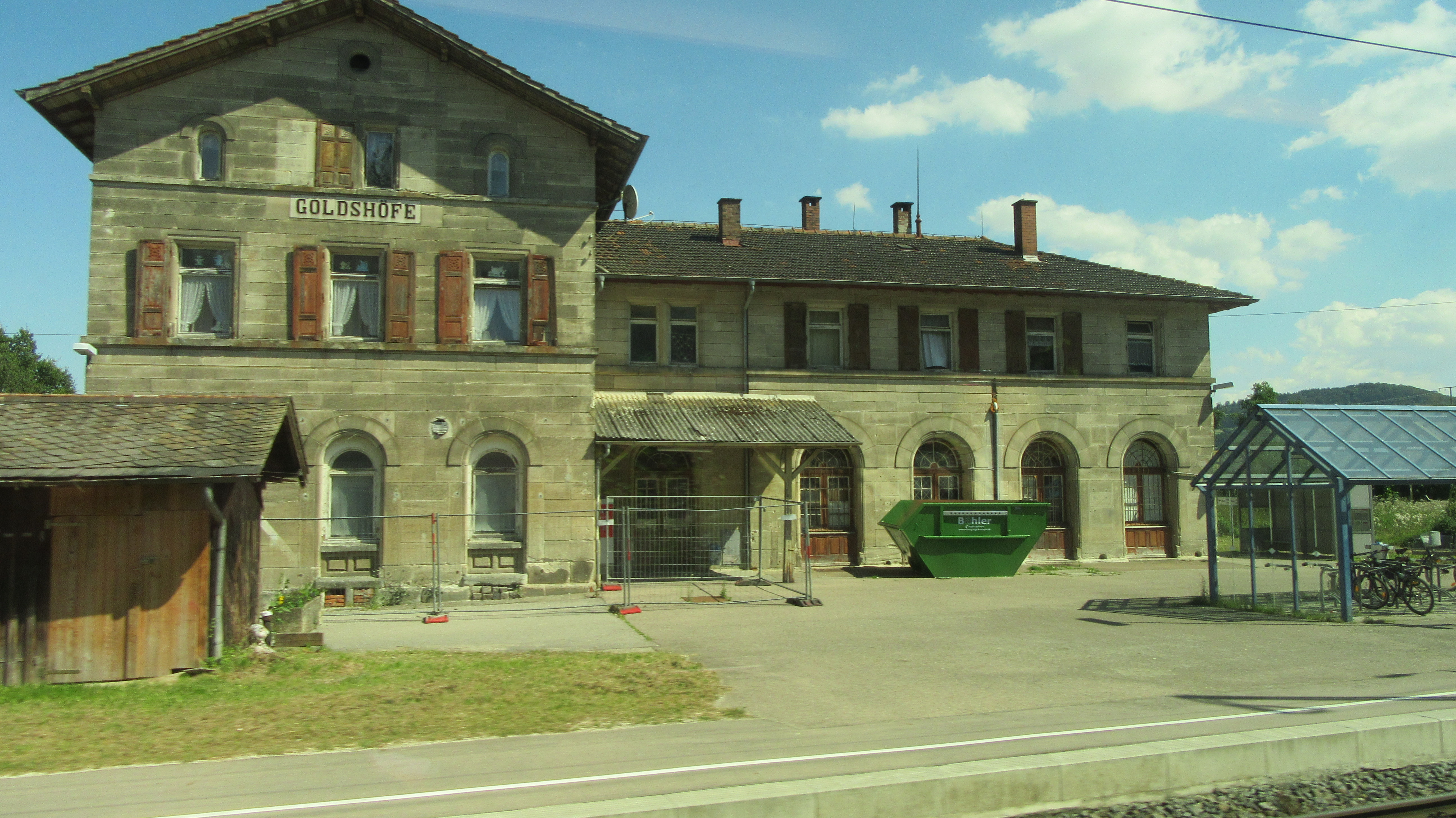 Das Empfangsgebäude des Keilbahnhofs Goldshöfe